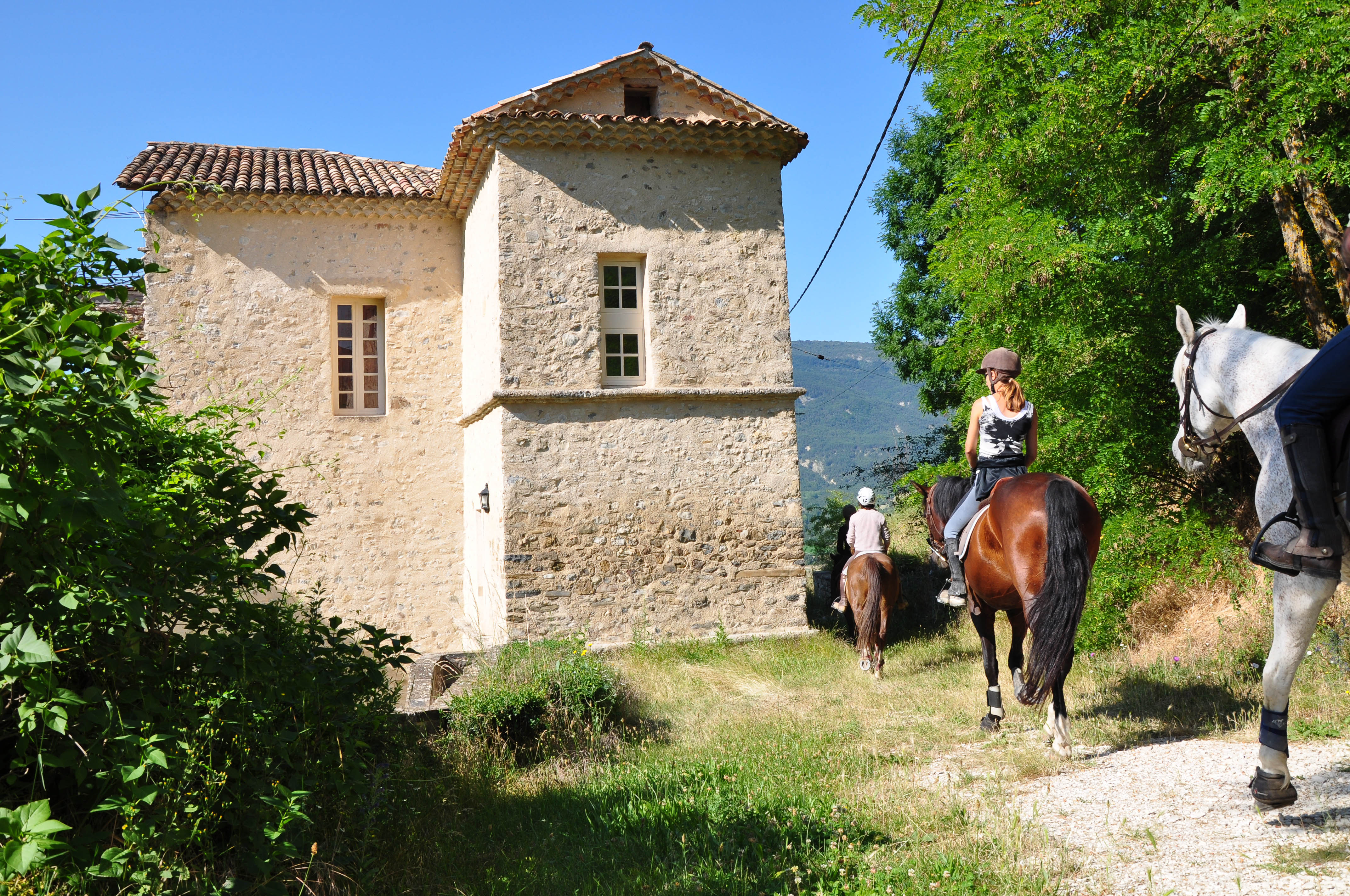 Château à Clumanc